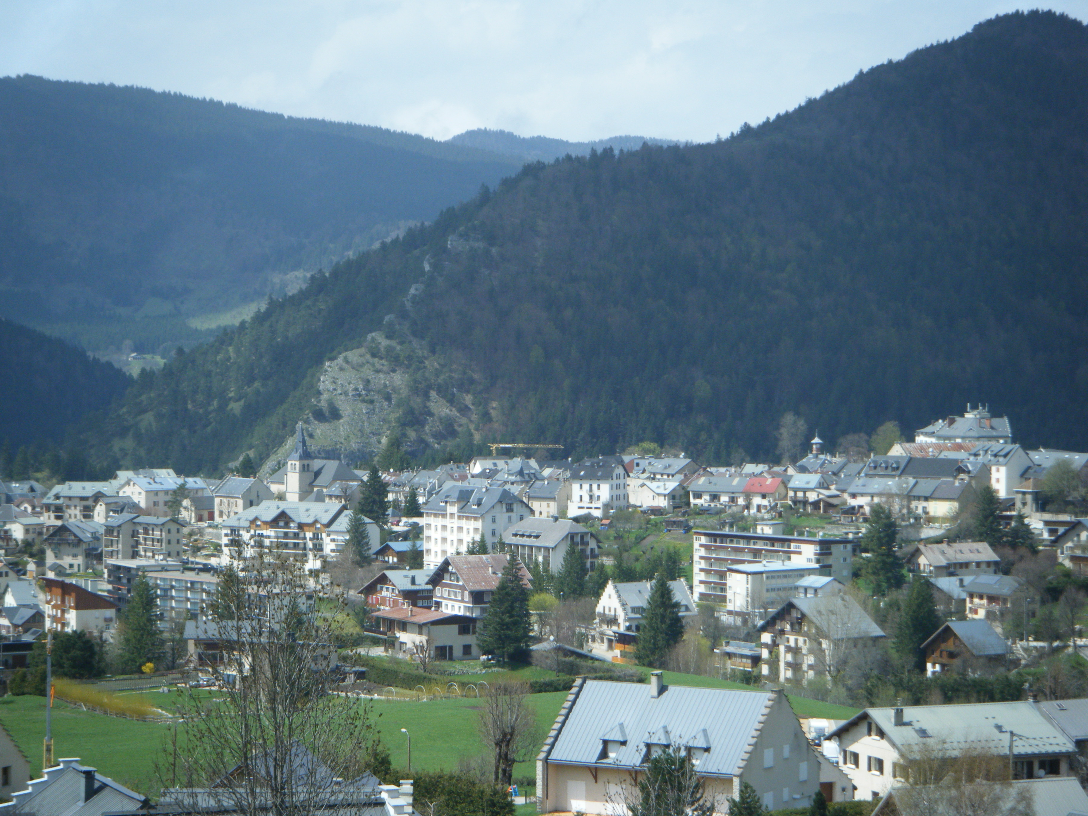 Vue de Villard direction nord-ouest